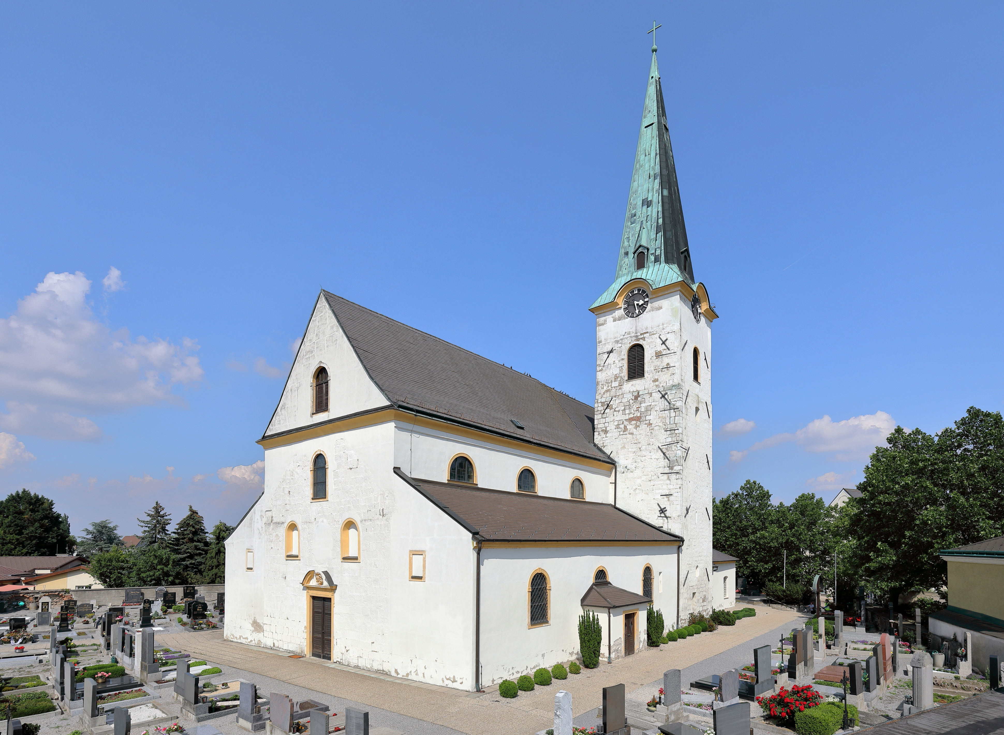 Südwestansicht der röm.-kath. Pfarrkirche hl. Martin in der niederösterreichischen Marktgemeinde Lassee. Ursprünglich als Wehrkirche im 13. Jahrhundert errichtet. Im 14. Jahrhundert wurde sie zu einer dreischiffigen Basilika erweitert und Ende des 18. Jahrhunderts fand eine Barockisierung des Sakralbaues statt.